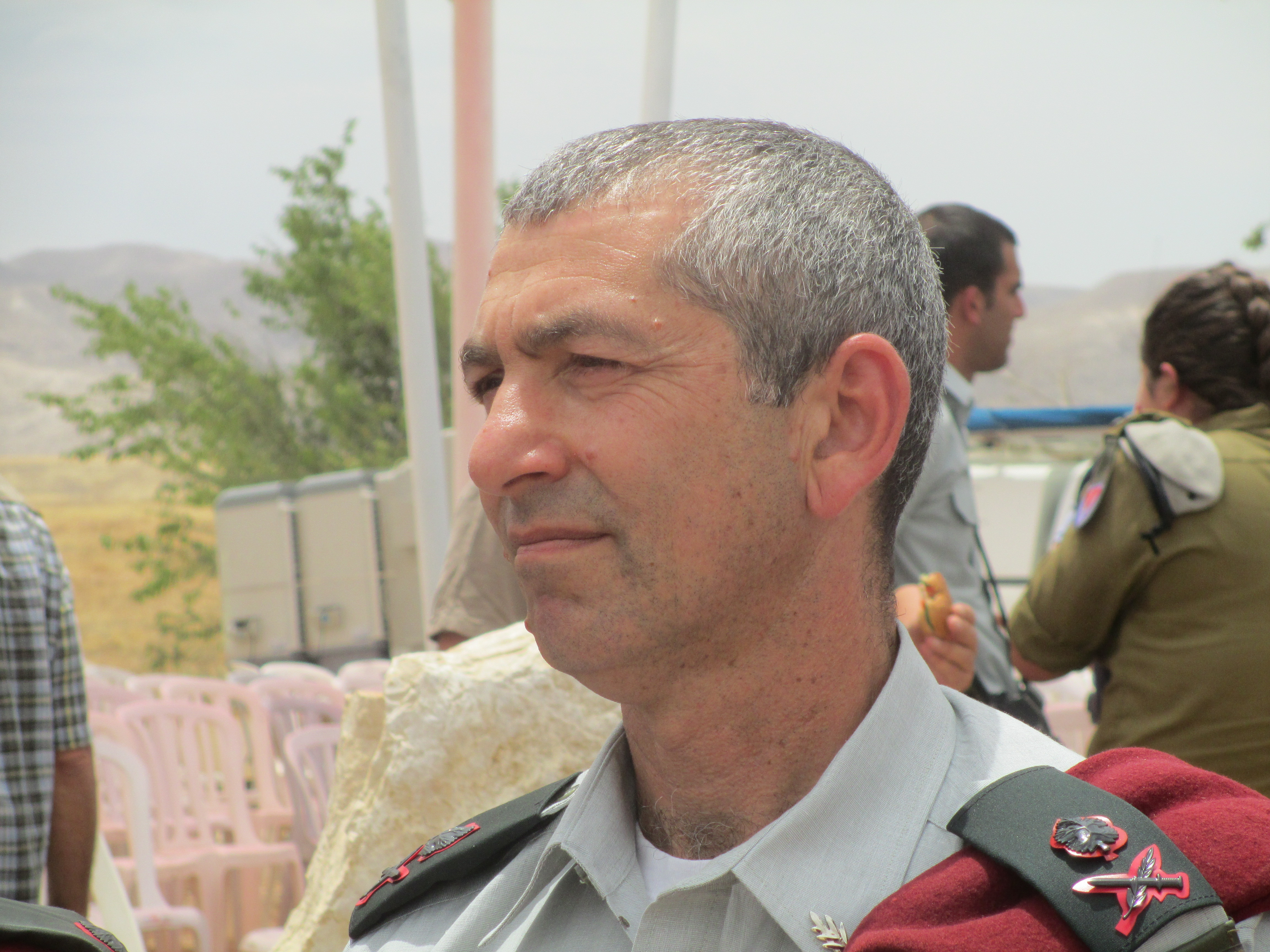 אלוף פיקוד המרכז רוני נומה בטכס אזכרה באנדרטת הנ"ד